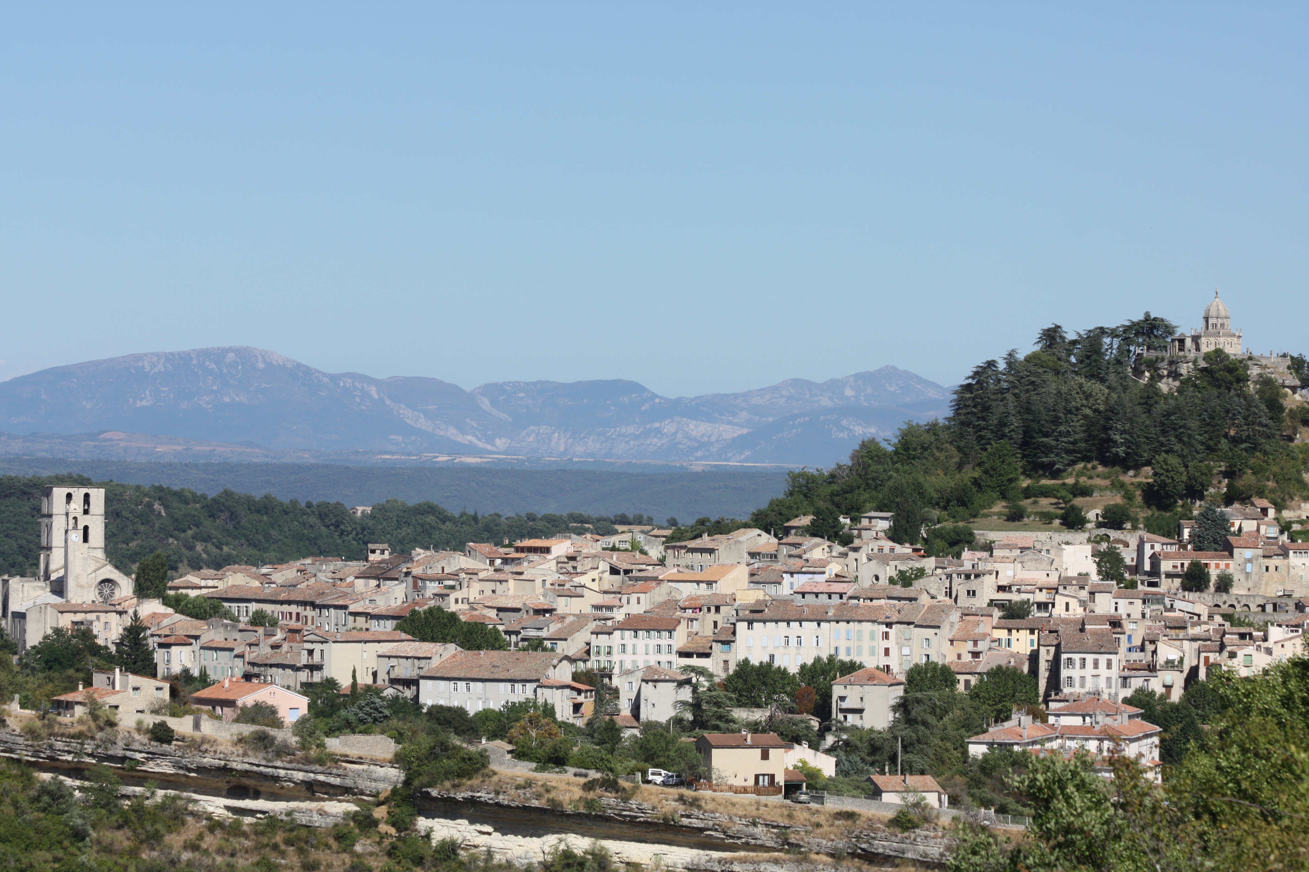 Vue de Forcalquier